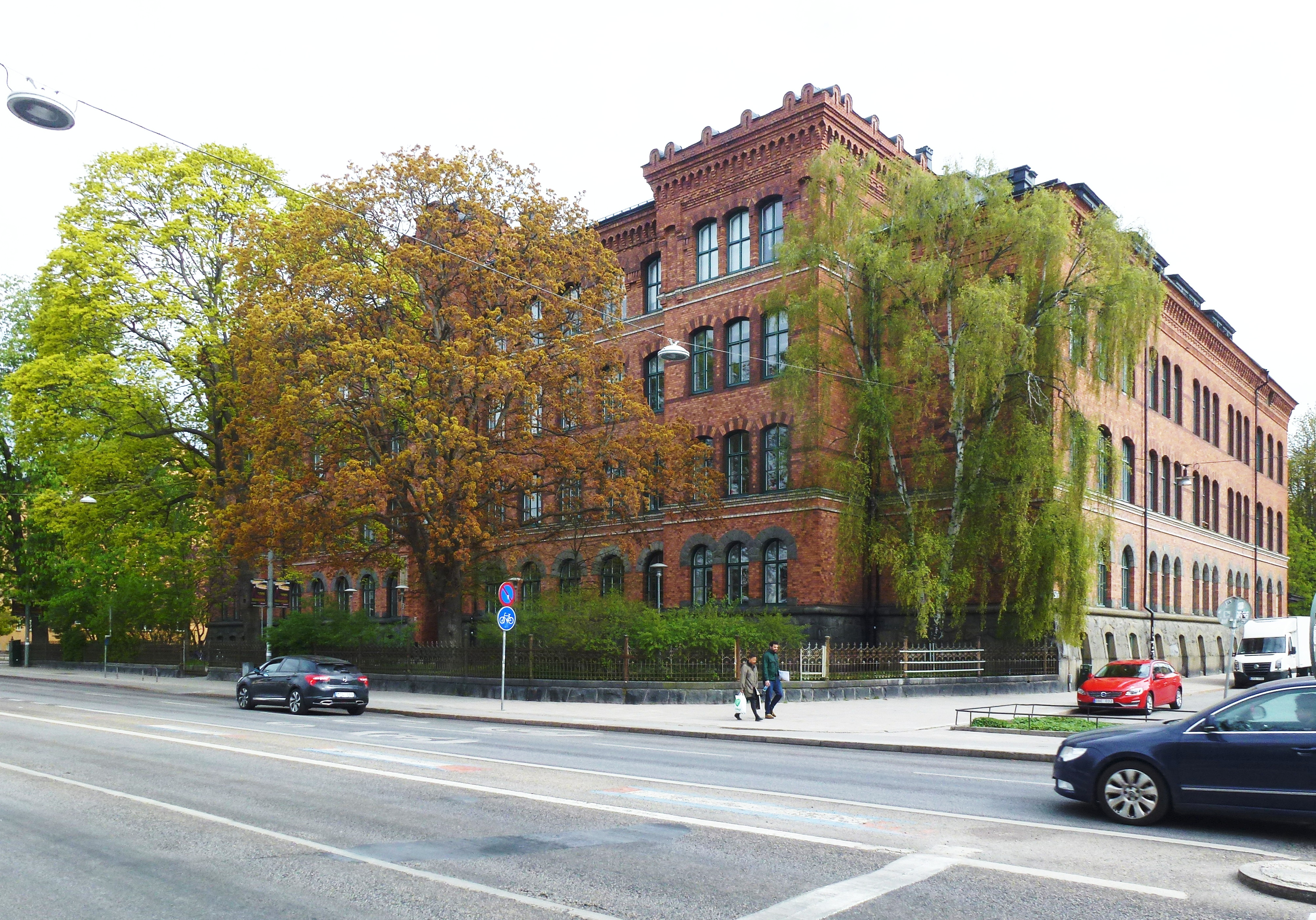 Maria folkskola (mot Ringvägen) arkitekt Ernst Haegglund